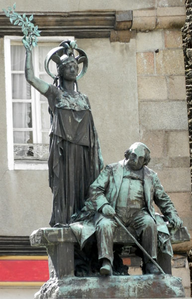 Landreger. Monumant Ernest Renan. Talbenn